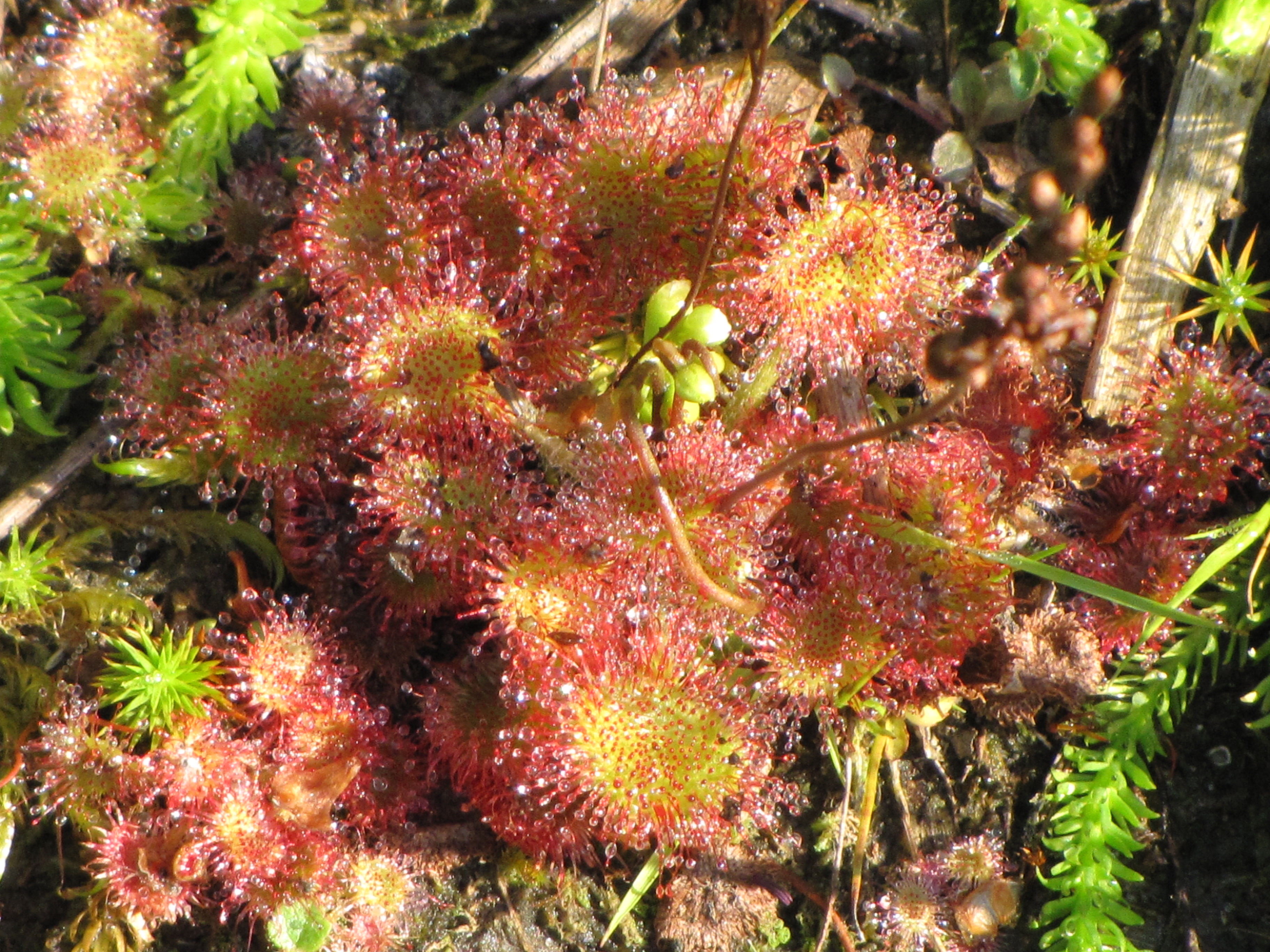 Sonnentau (Drosera rotundifolia) in Wymeer (NSG Hochmoor Wymeer)